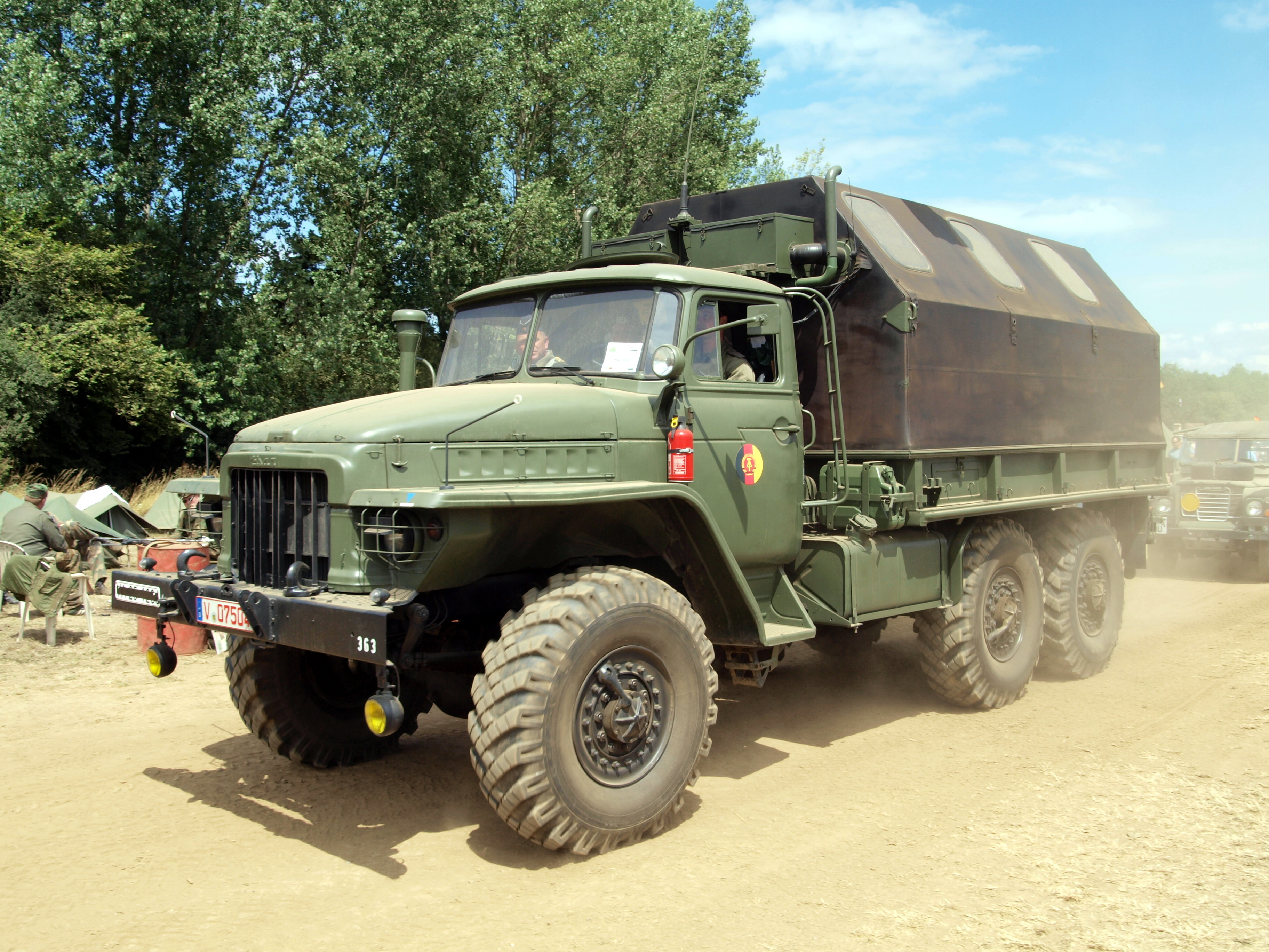 URAL-375D